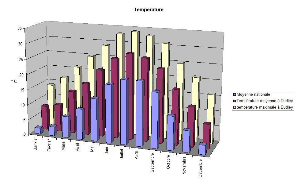 Températures maximales et moyennes à Dudley (Géorgie, Etats-Unis), et comparaison avec la moyenne nationale